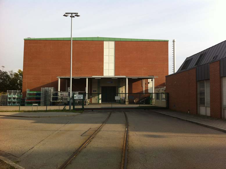 Schienenzufahrt zum Brennelemente-Eingangslager auf dem ehemaligen Gelände der Wiederaufarbeitungsanlage Wackersdorf, heute von BMW als "Geb. 80.0" genutzt.